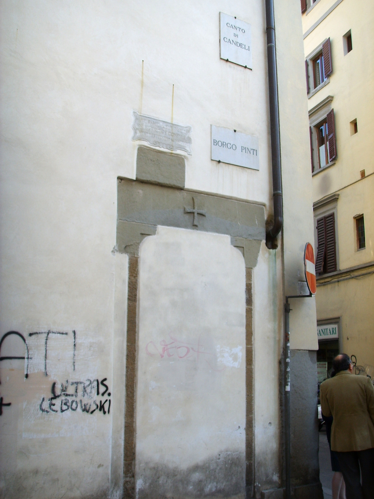 Firenze, via de' Pilastri angolo Borgo Pinti: la vecchia entrata murata alla chiesa di Santa Maria di Candeli.